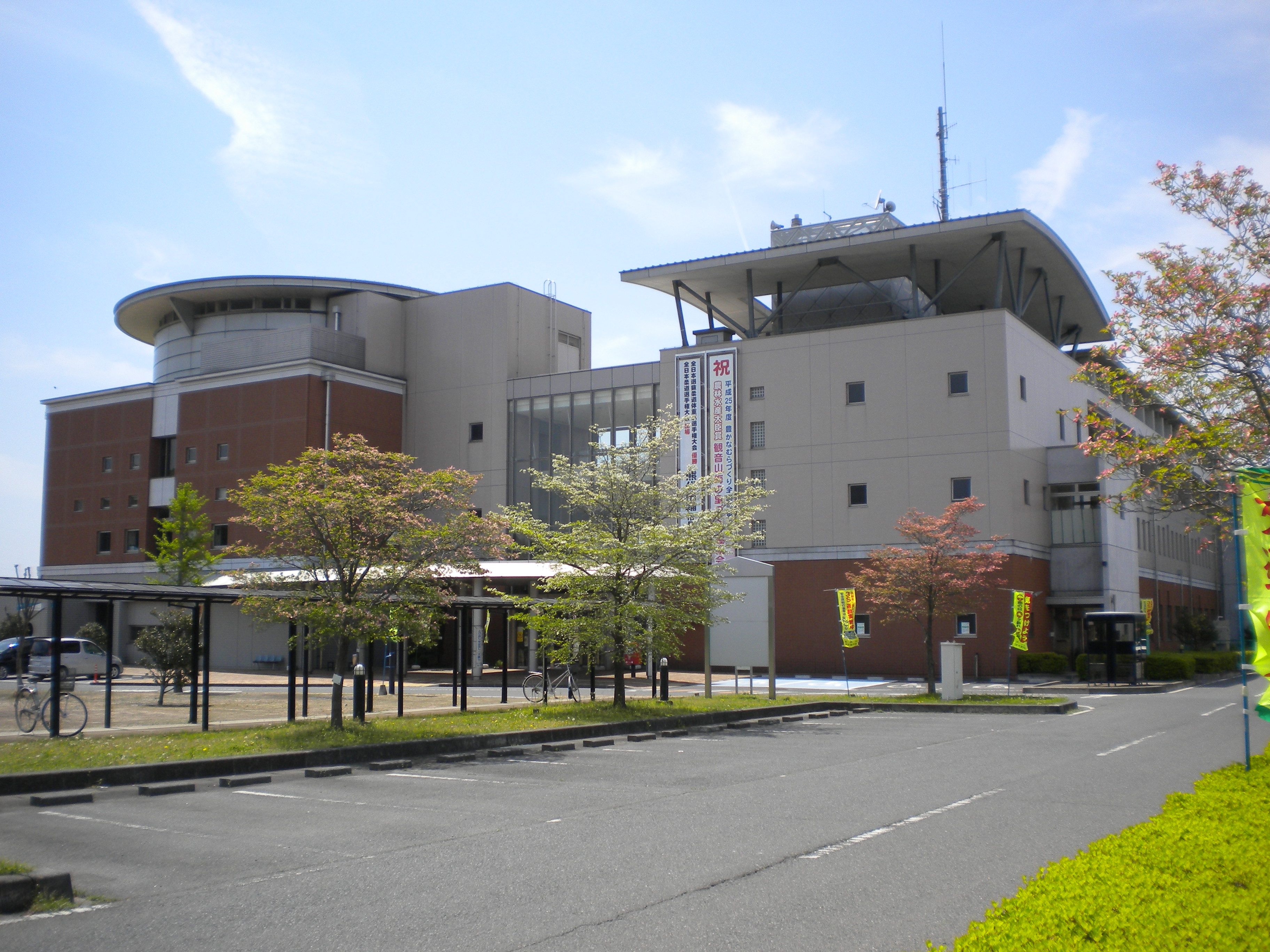 市貝町役場 栃木県芳賀郡市貝町大字市塙 投稿者撮影